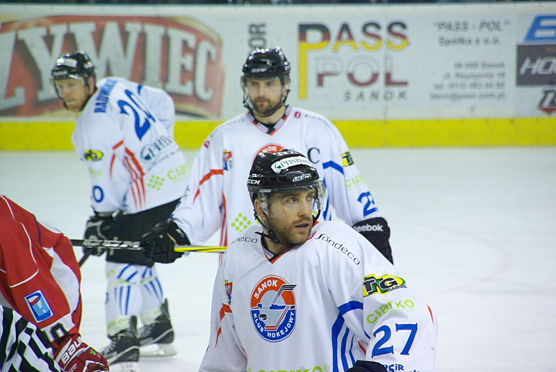 Wojciech Milan, Maciej Mermer i Michał Radwański w barwach Ciarko PBS Bank Sanok podczas piątego meczu finałowego o Mistrzostwo Polski 2011/2012 z ComArch Cracovią (Arena Sanok, 14 marca 2012)